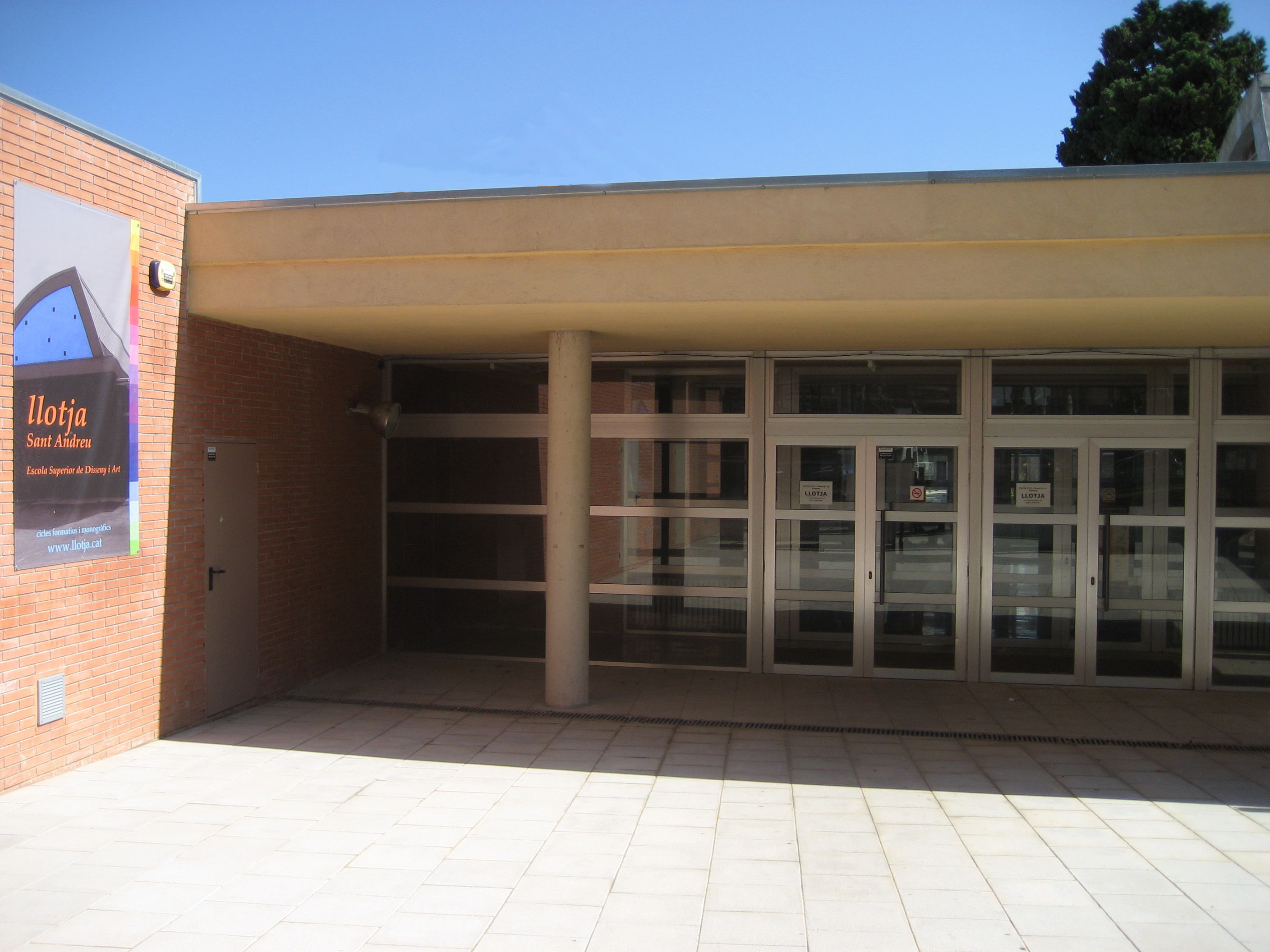 Escola de Llotja a Sant Andreu, Barcelona, Catalunya.